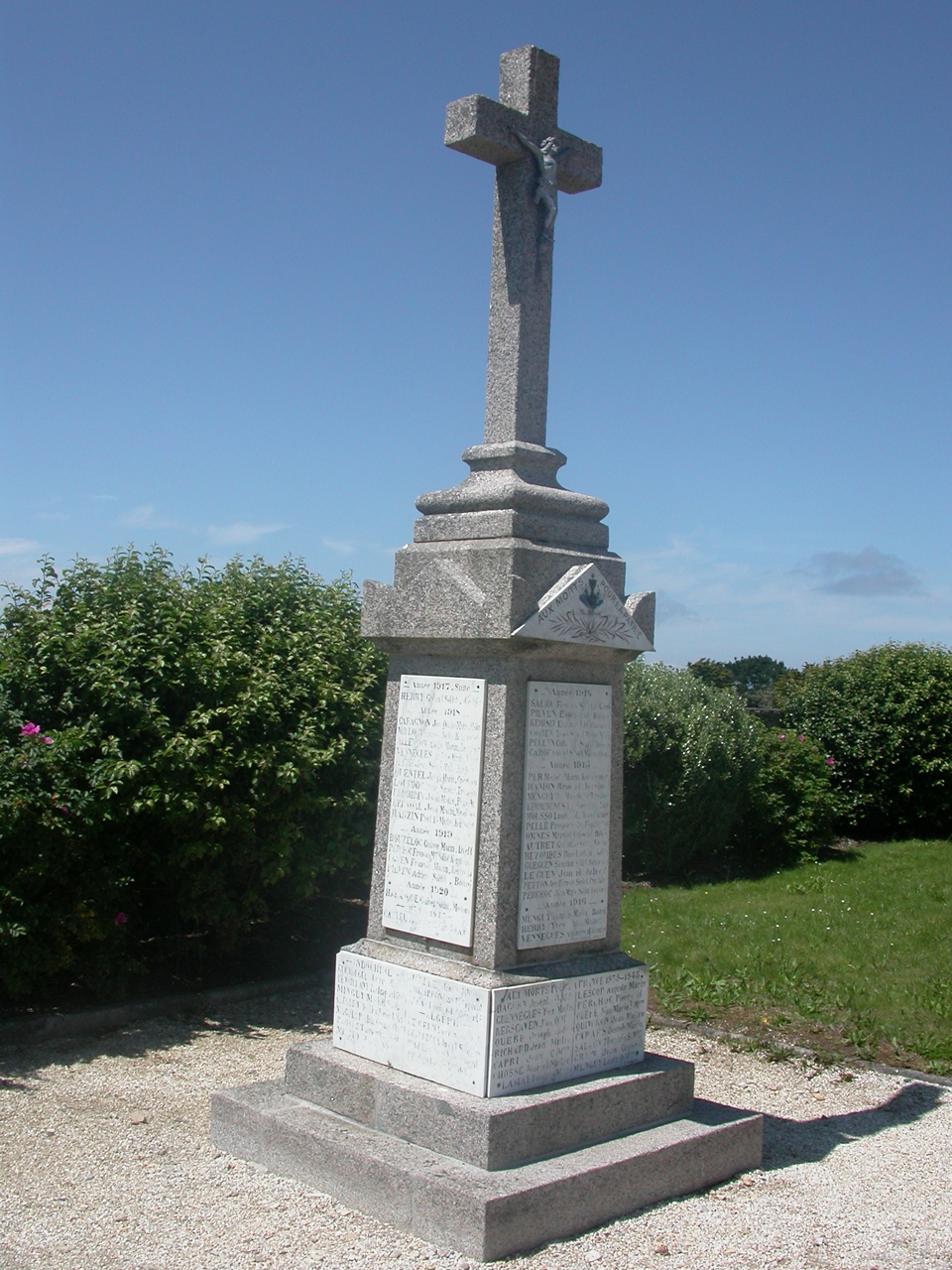 Monument aux morts - Porspoder-29